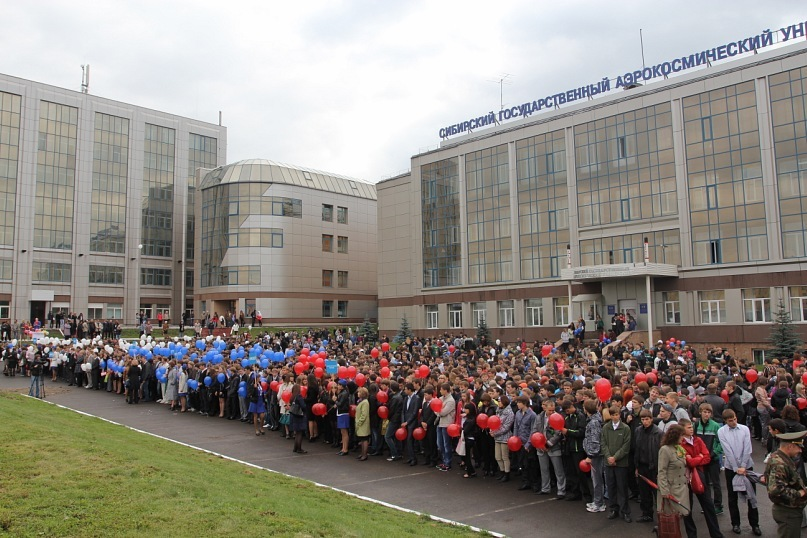 Студенты СибГАУ перед административным корпусом университета